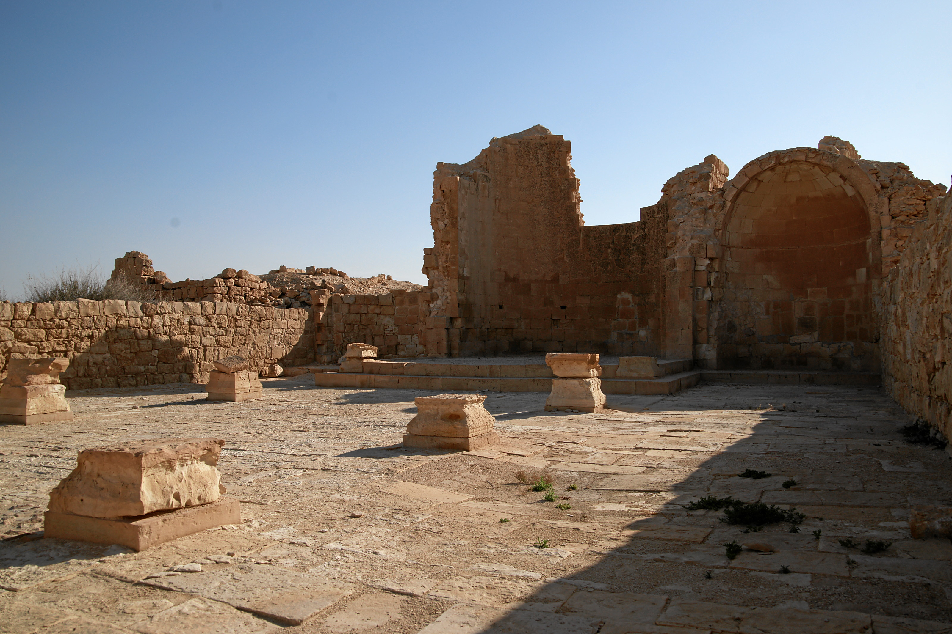 Shivta: Central Church